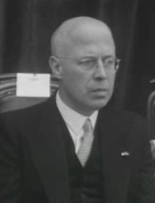 Louis Beel tijdens de Heiligdomsvaart van 1955 in Maastricht.